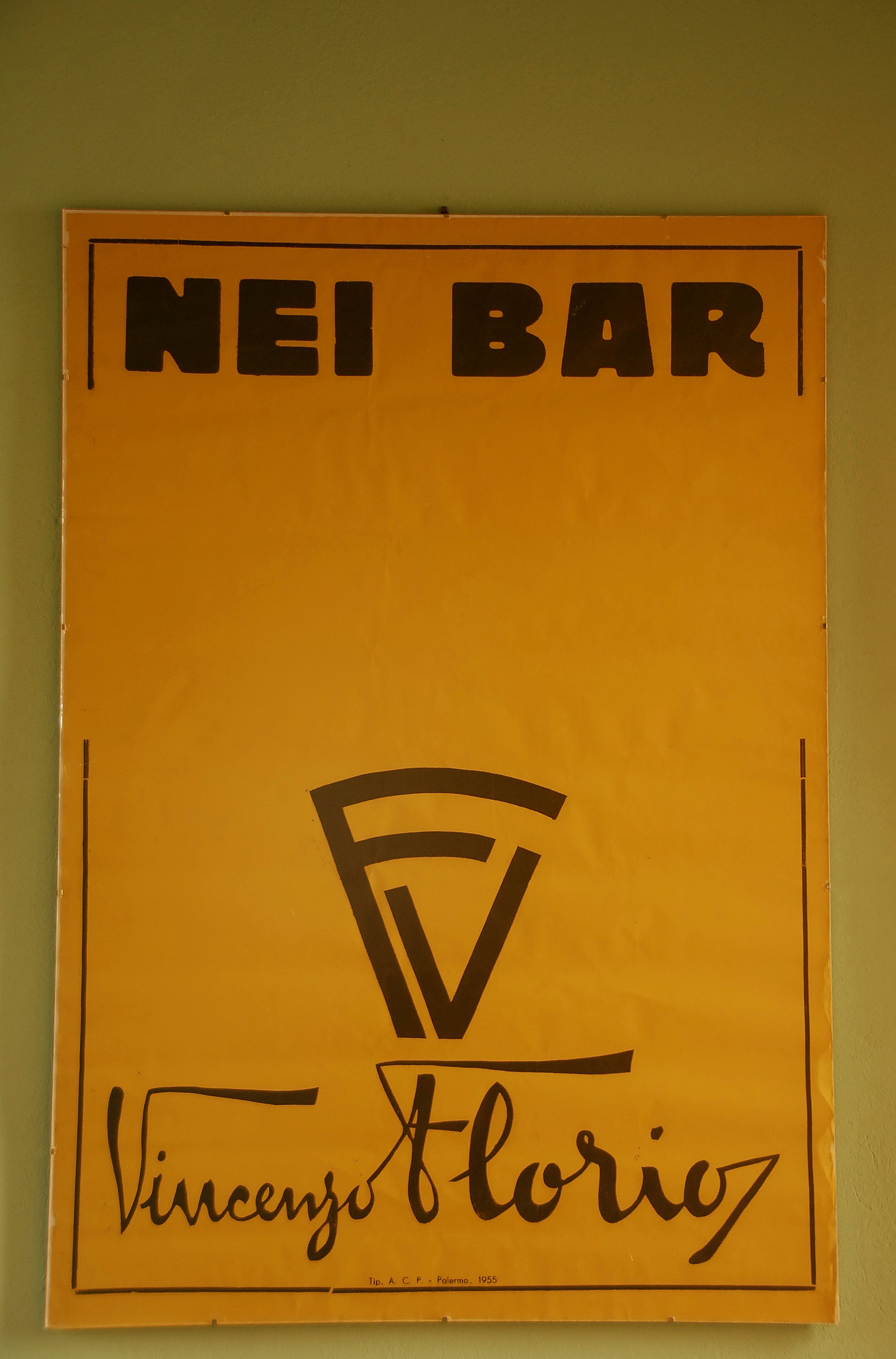 Palermo, ITA